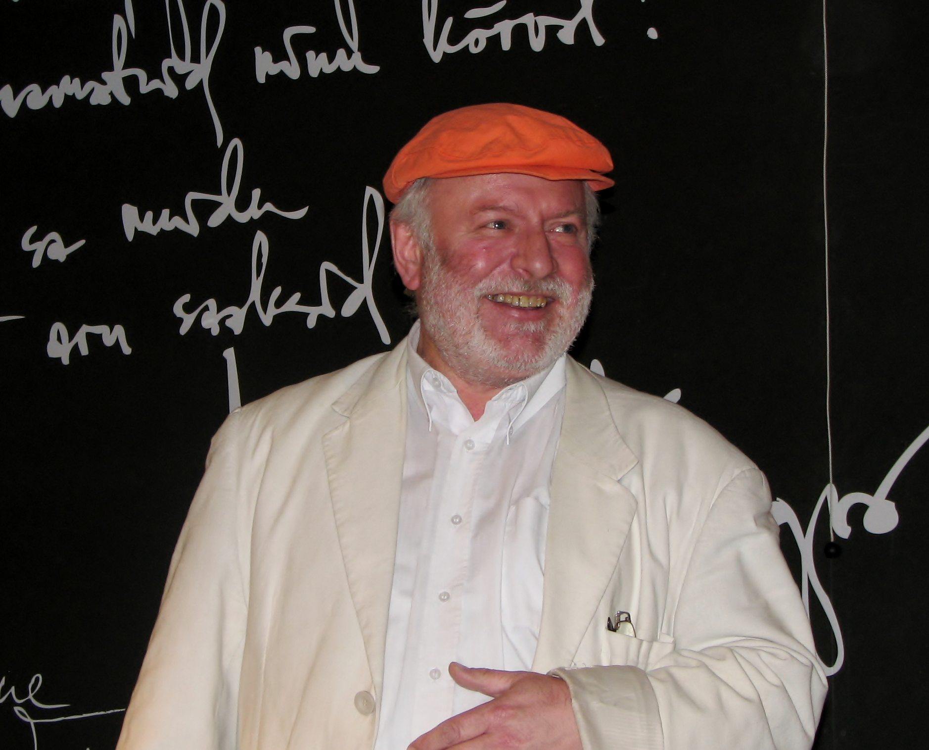 Jaan Arder esinemas Apelsini koosseisus Solarise keskuse Apollo raamatupoes plaadi "Kauge Hüüd" esitlusel